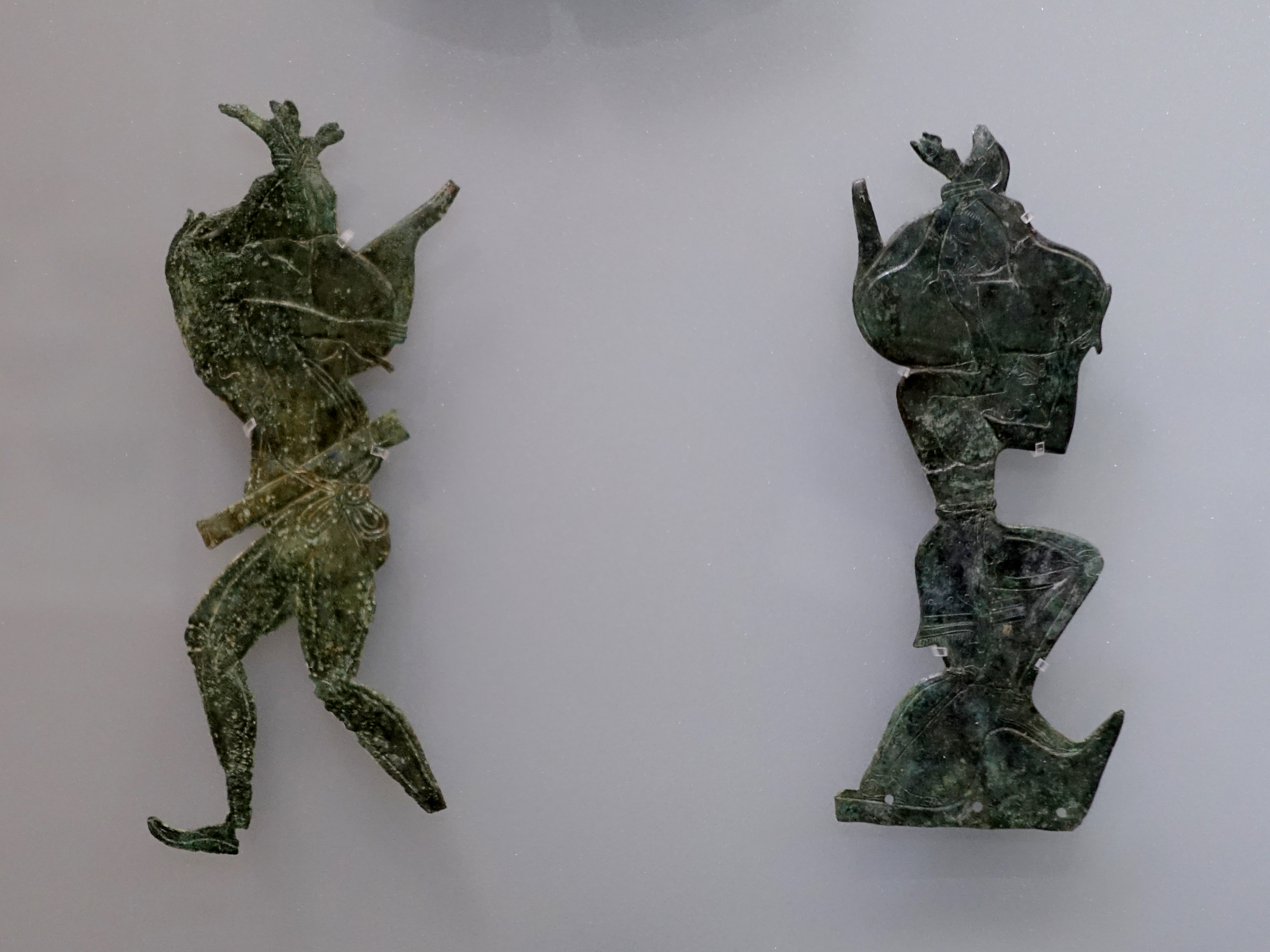 Durch Hämmern und Gravieren verzierte ausgeschnittene Bronzeplatten (Archaisch-Klassische Zeit, 7. bis Mitte des 5. Jahrhunderts v. Chr.), gefunden im Heiligtum des Hermes und der Aphrodite bei Symi, Archäologisches Museum von Iraklio, Kreta, Griechenland